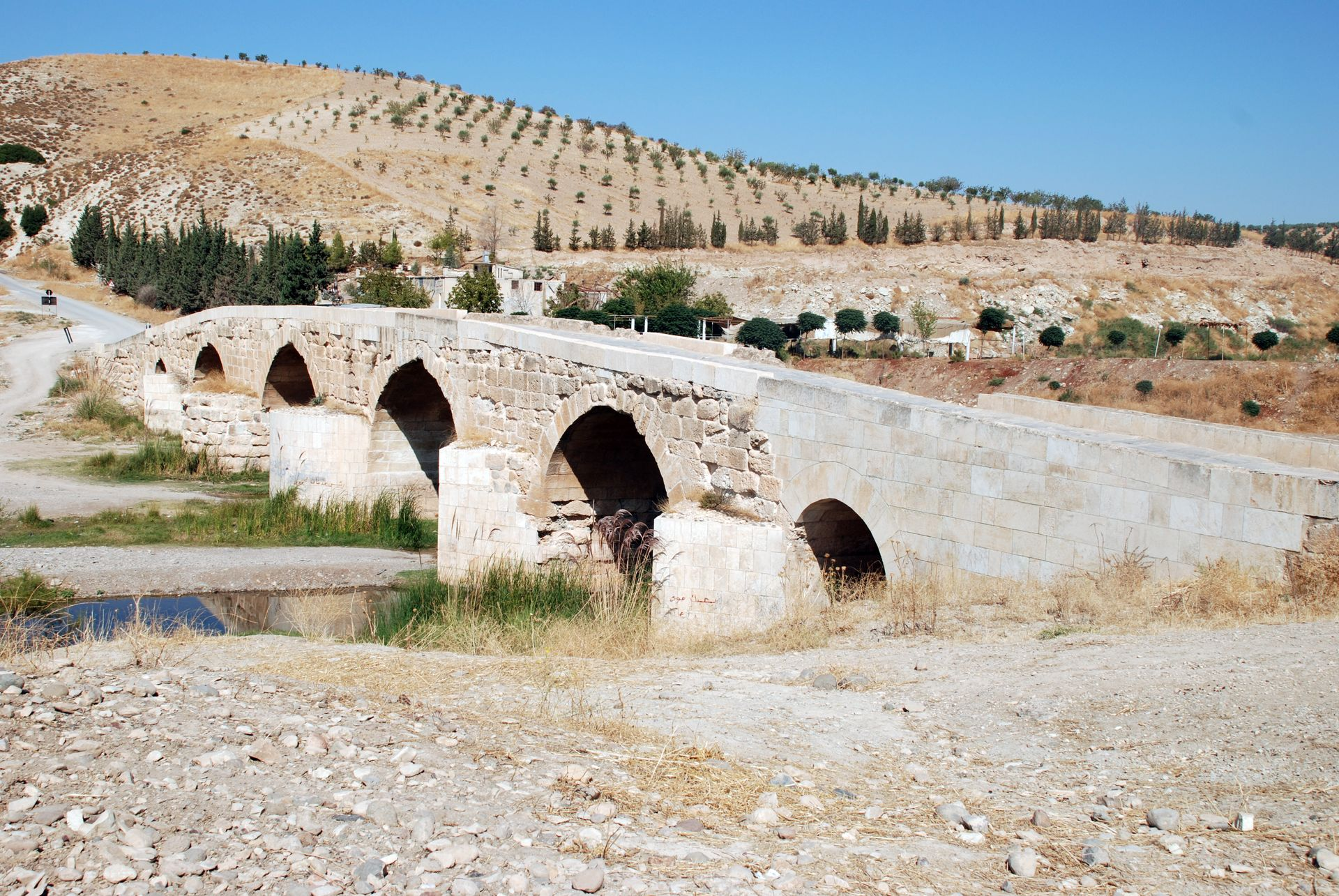 Römische Brücke über den Sabun bei Kyrrhos, Syrien